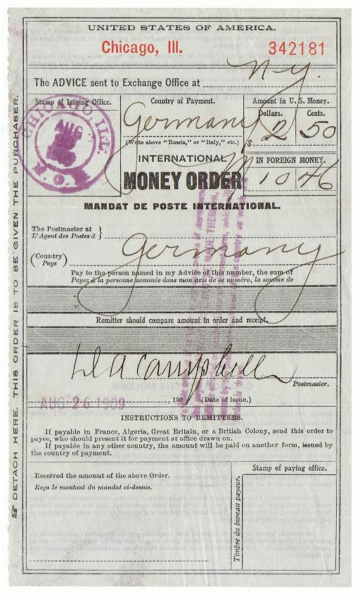 Eine Postanweisung (Postal Money Order) aus dem July 2019